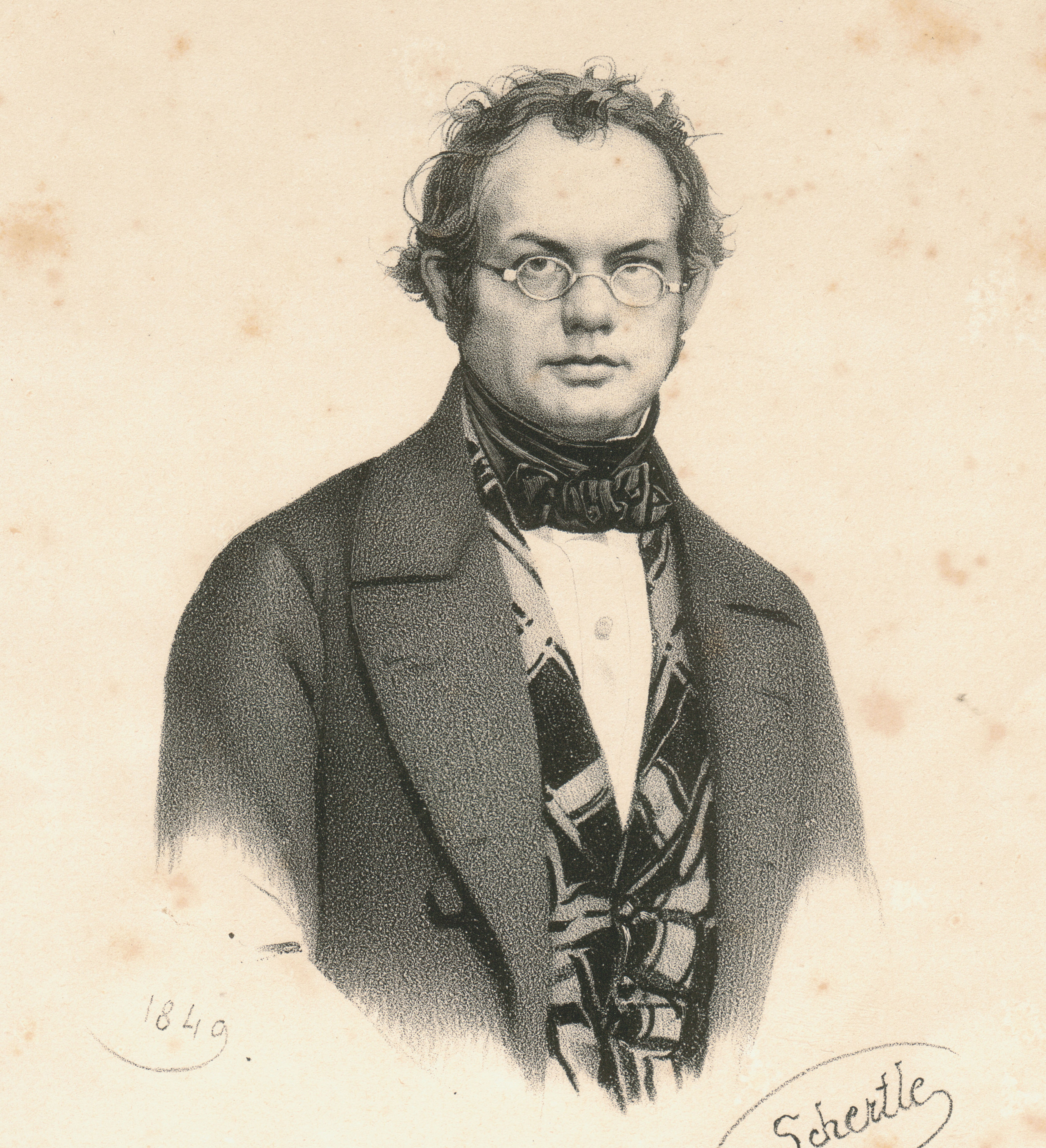 Porträt-Lithographie (Bruststück) des Politikers Carl Wilhelm Wippermann (1800 - 1857)